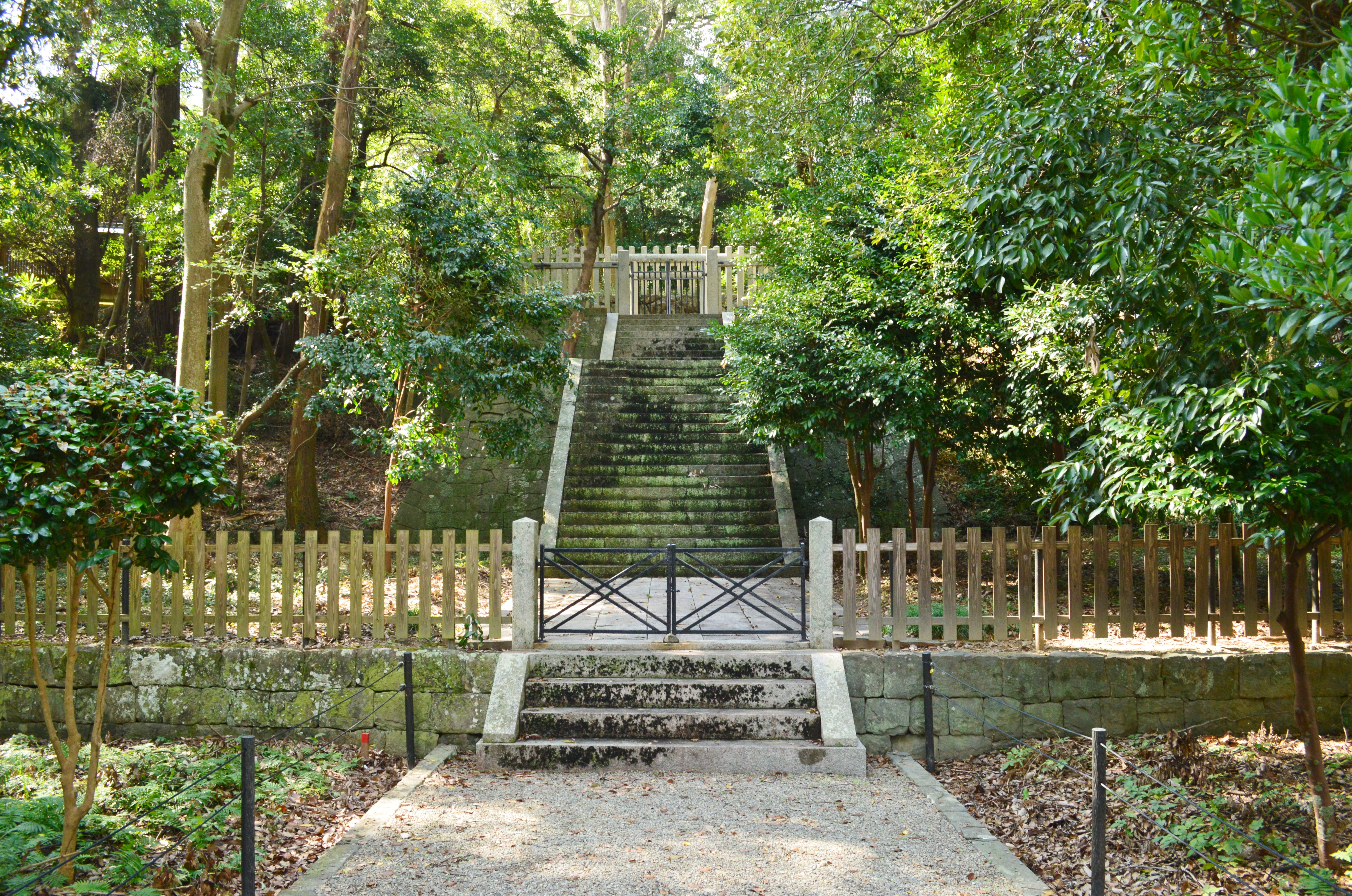 彦五瀬命竈山墓 拝所